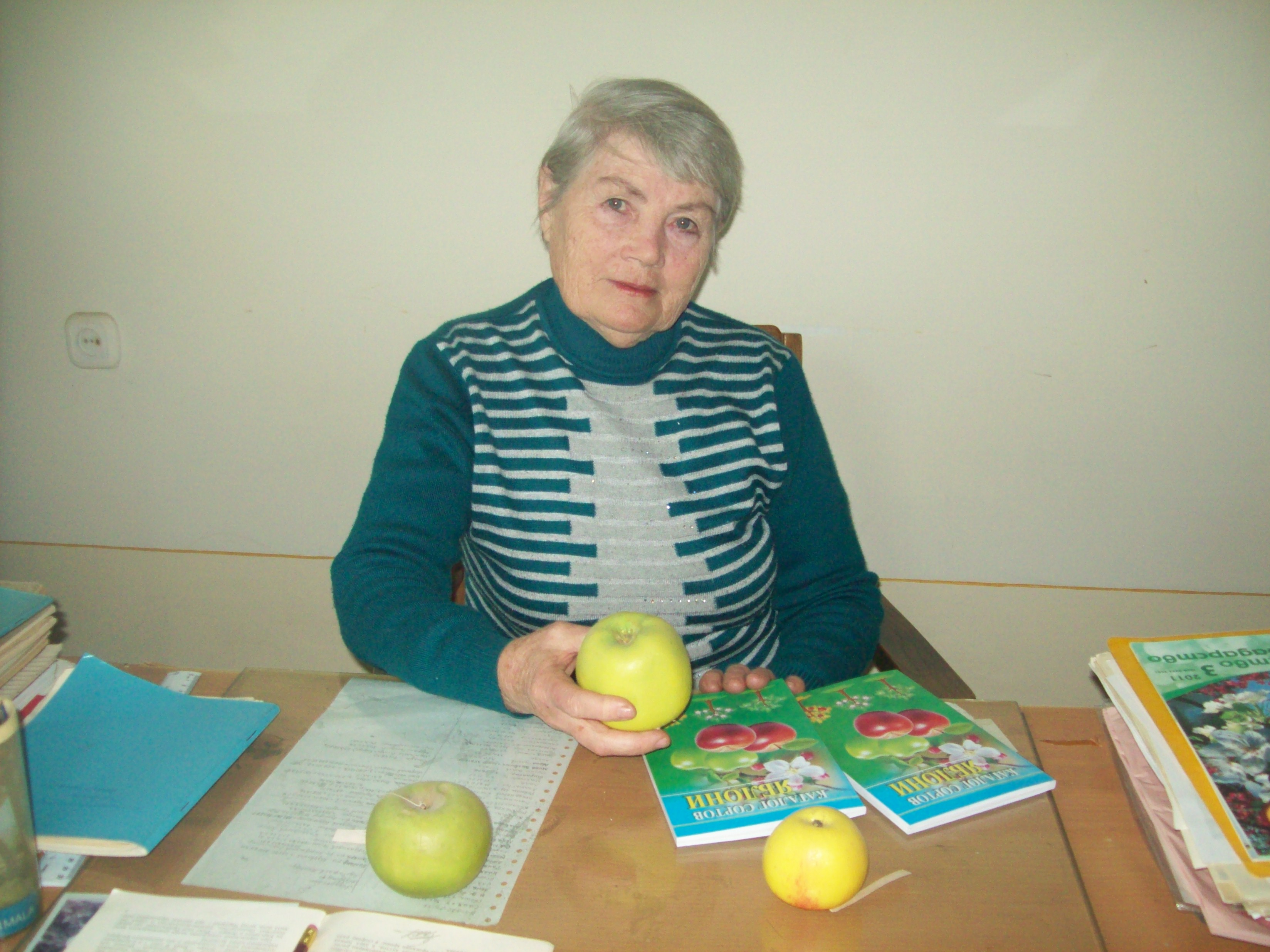 Внучка русского ученого Рихарда Шредер, Елена Шредер занимается изучением разных сортов яблони в институте Садоводства, виноградарства и виноделие имени М.Мирзаева